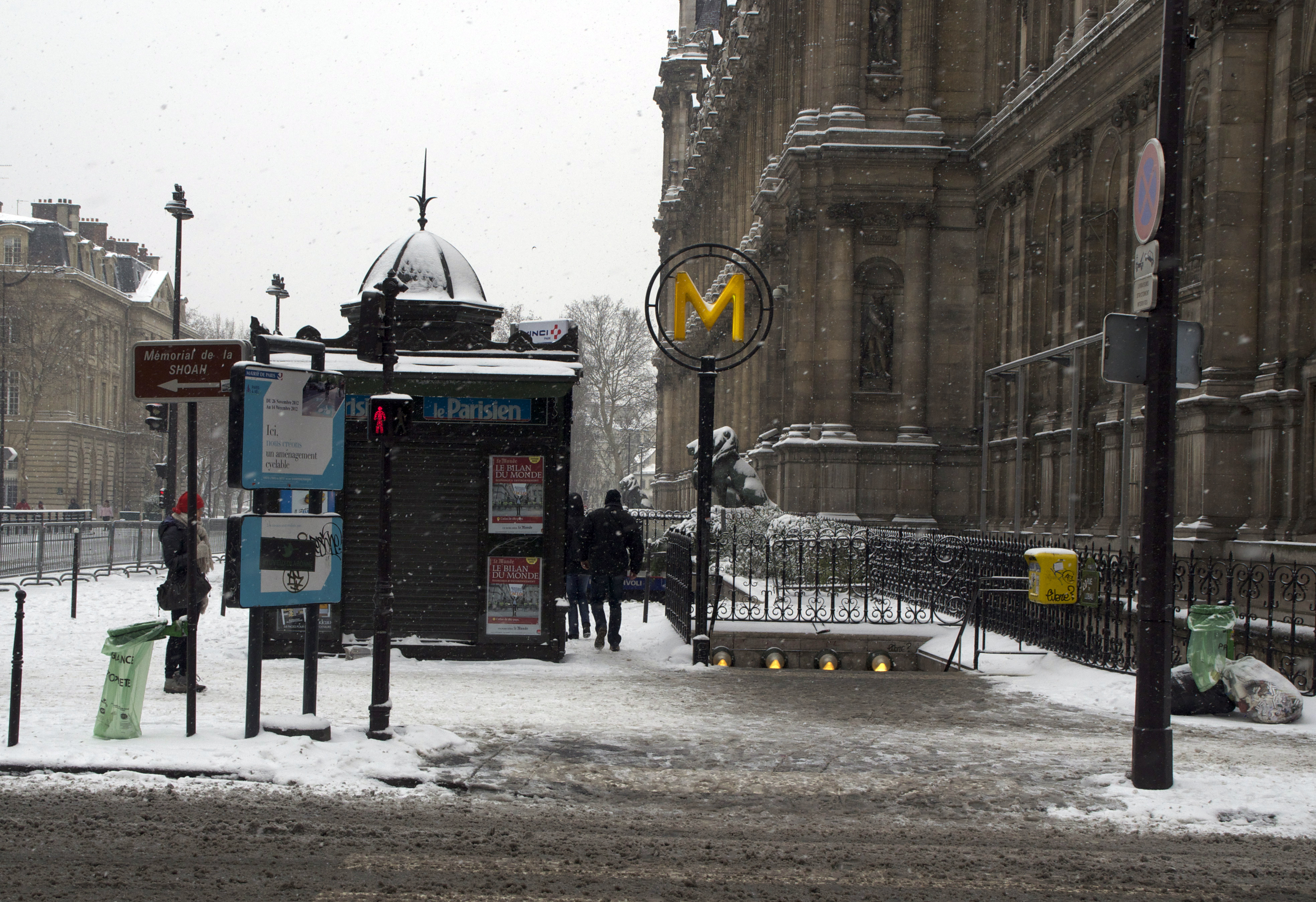 Rue de Laborde, Paris.